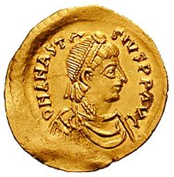 See File:Semissis-Anastasius I-sb0007.jpg.